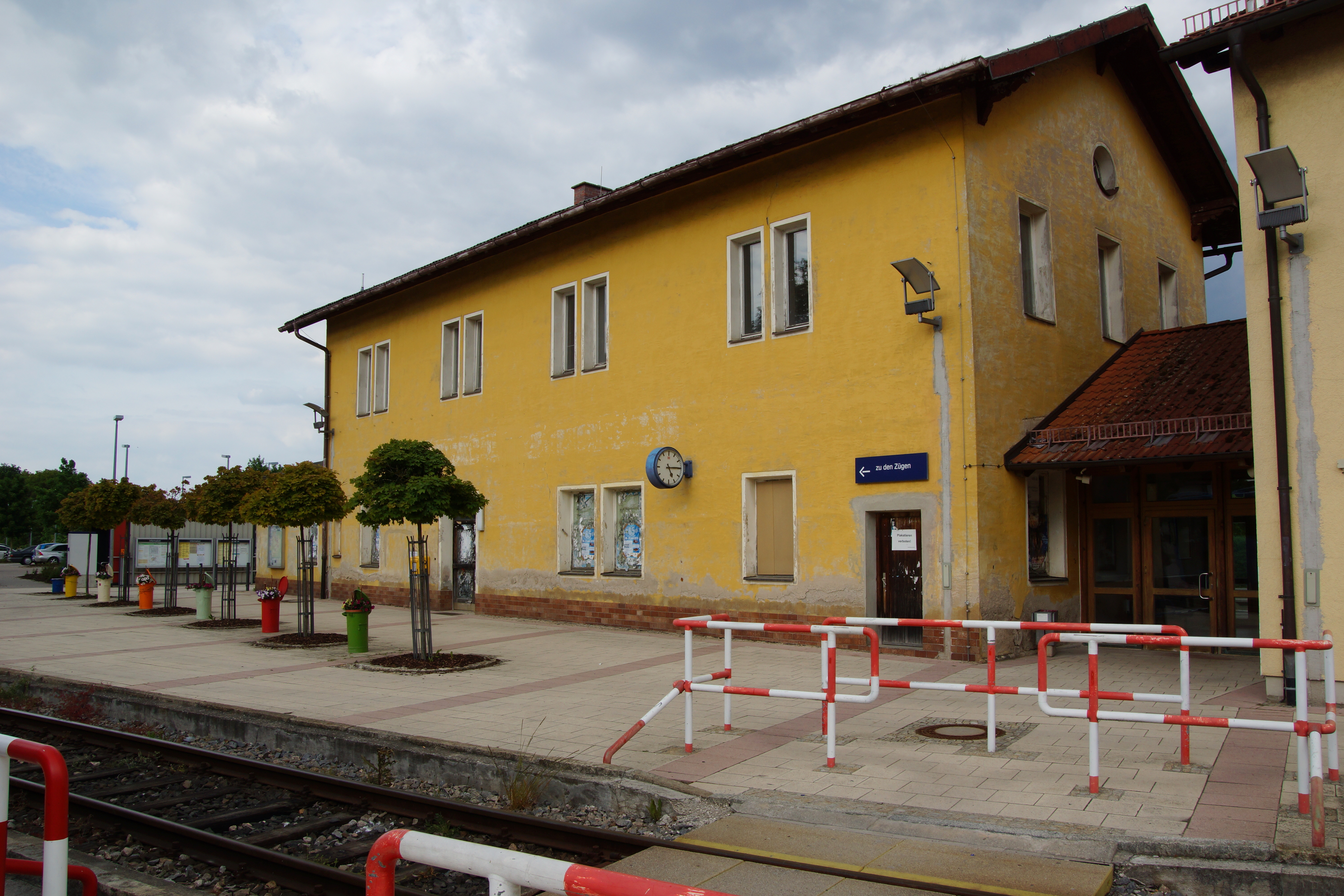 Der Bahnhof in der Oberpfälzer Stadt Maxhütte-Haidhof